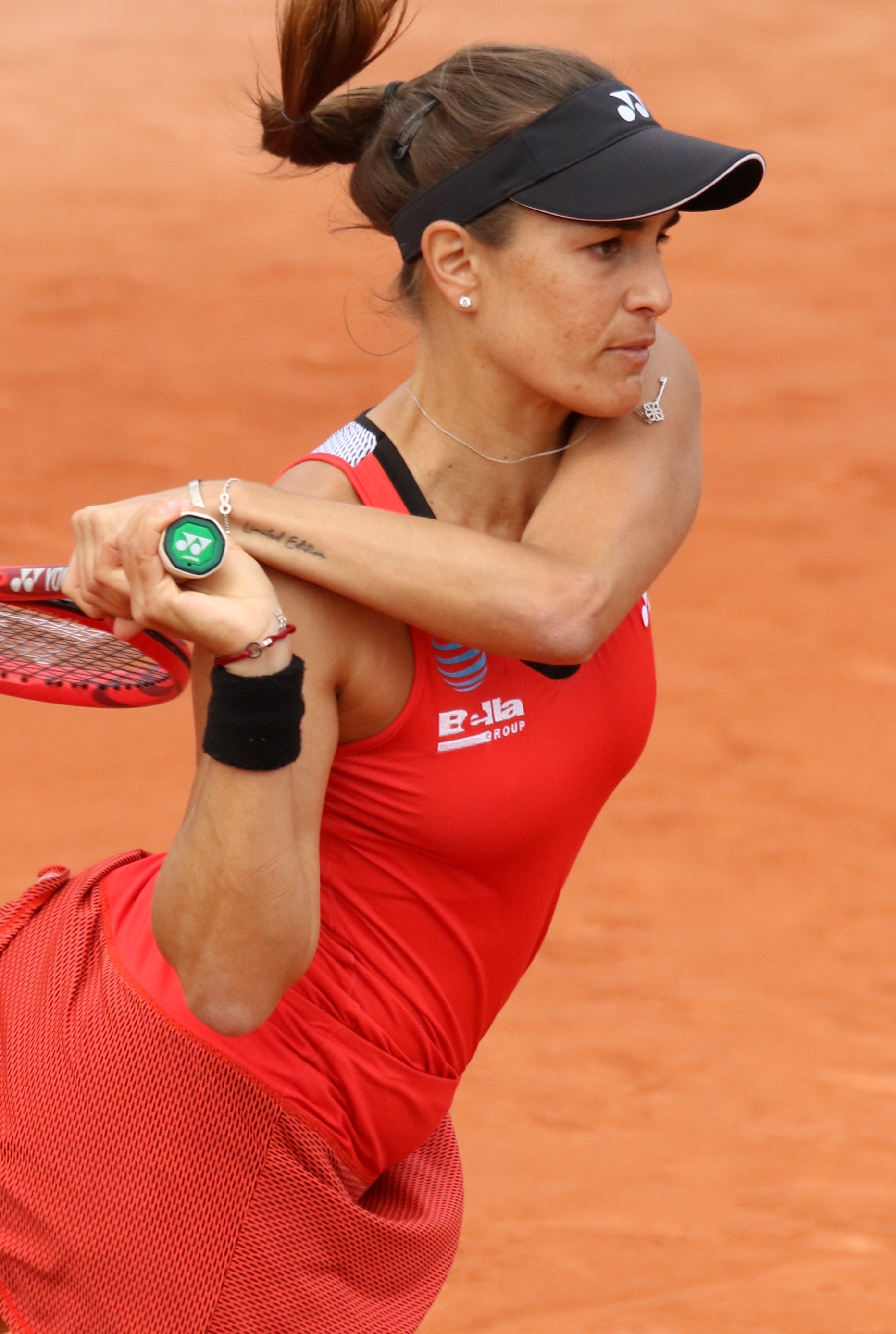 Puig RG19 (37)